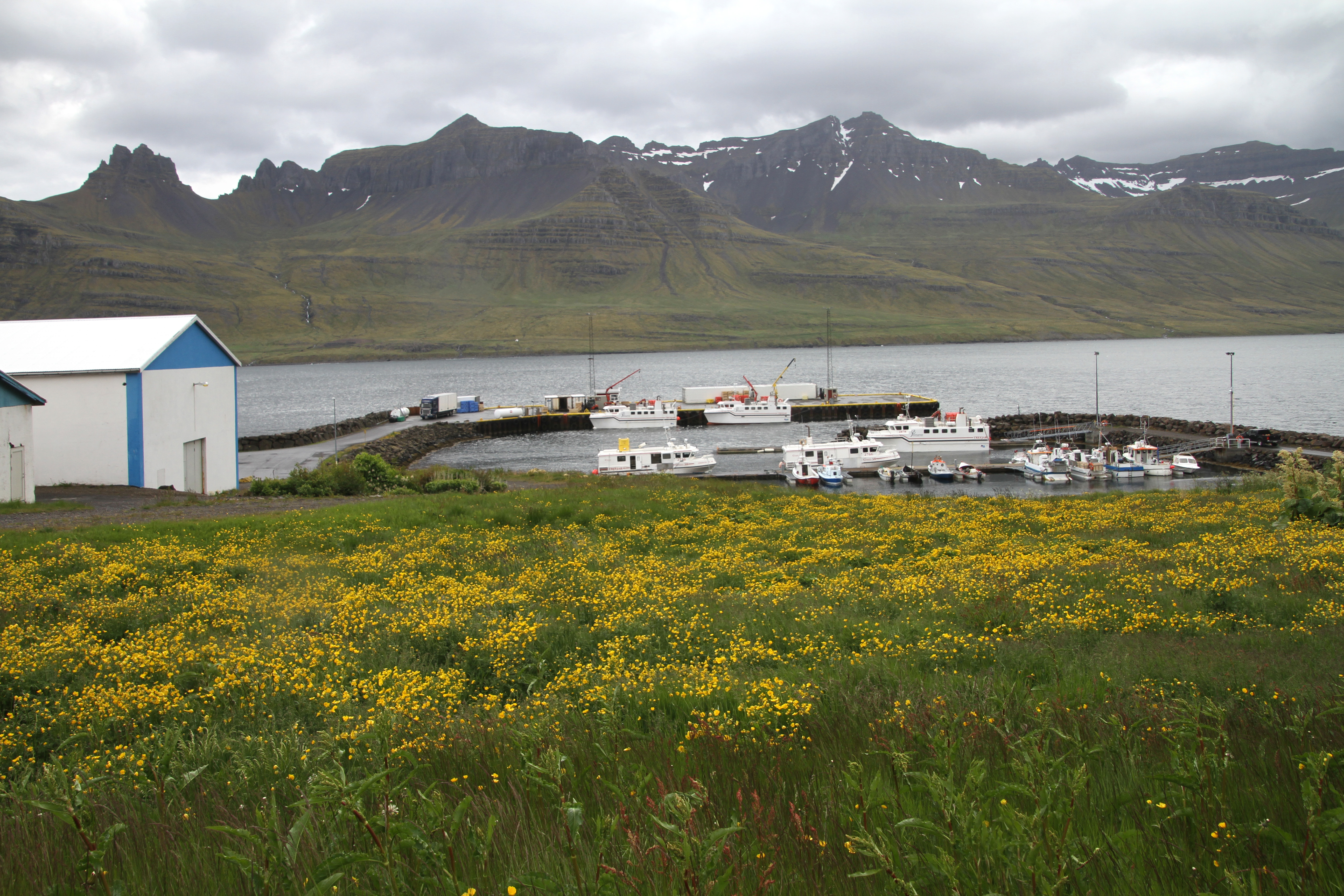 Stöðvarfjörður